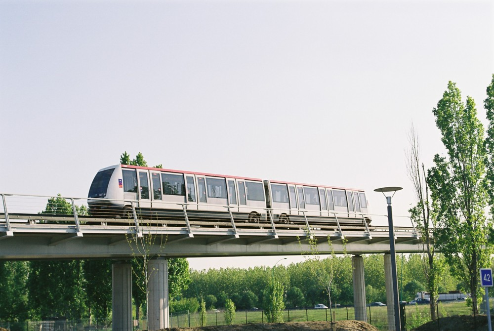 Viaduc de la ligne A a Balma-Gramont